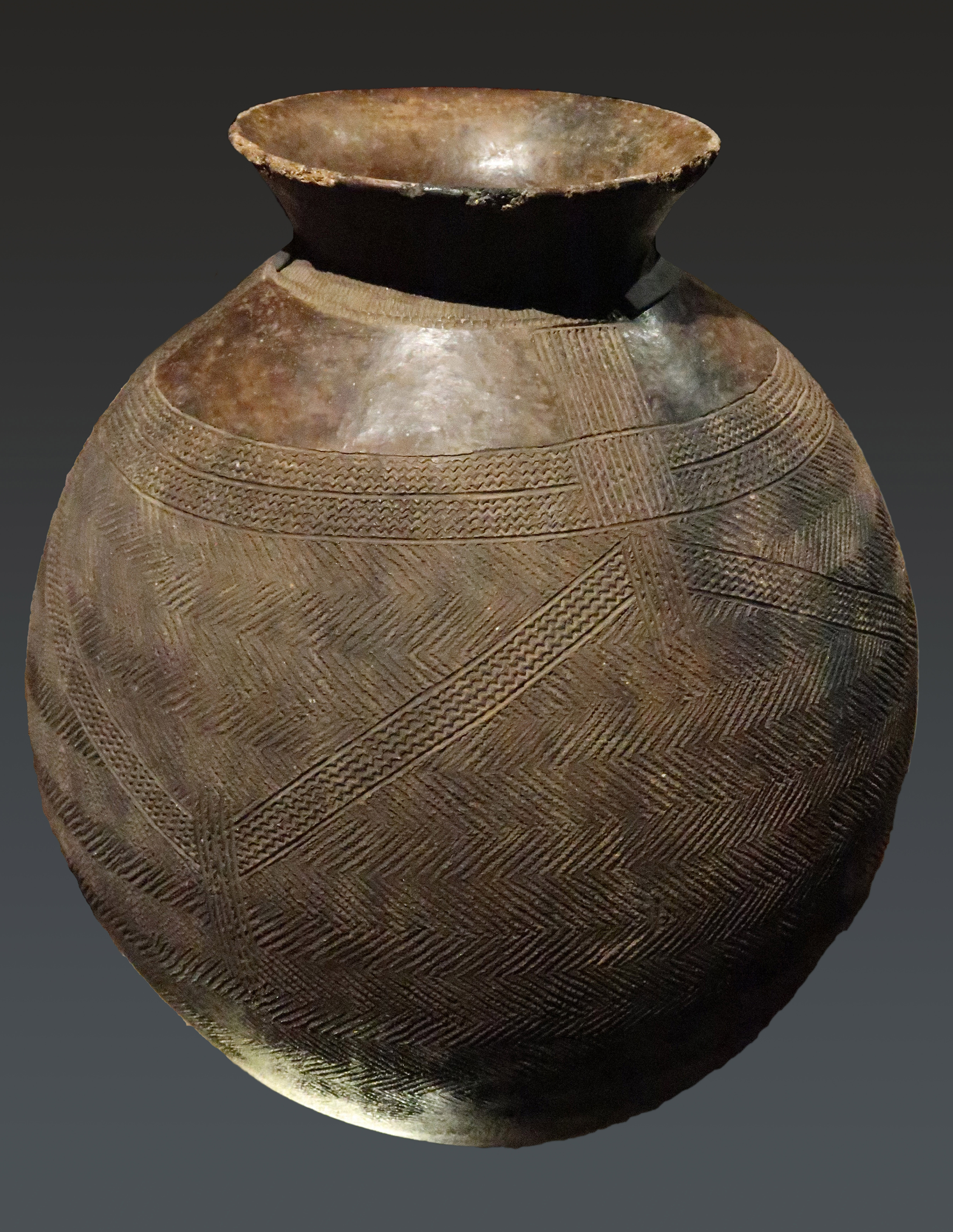 Jarre en terre cuite Burkina Faso. Sitiéna. Population Karaboro. XXe siècle. Lyon. Musée des Confluences